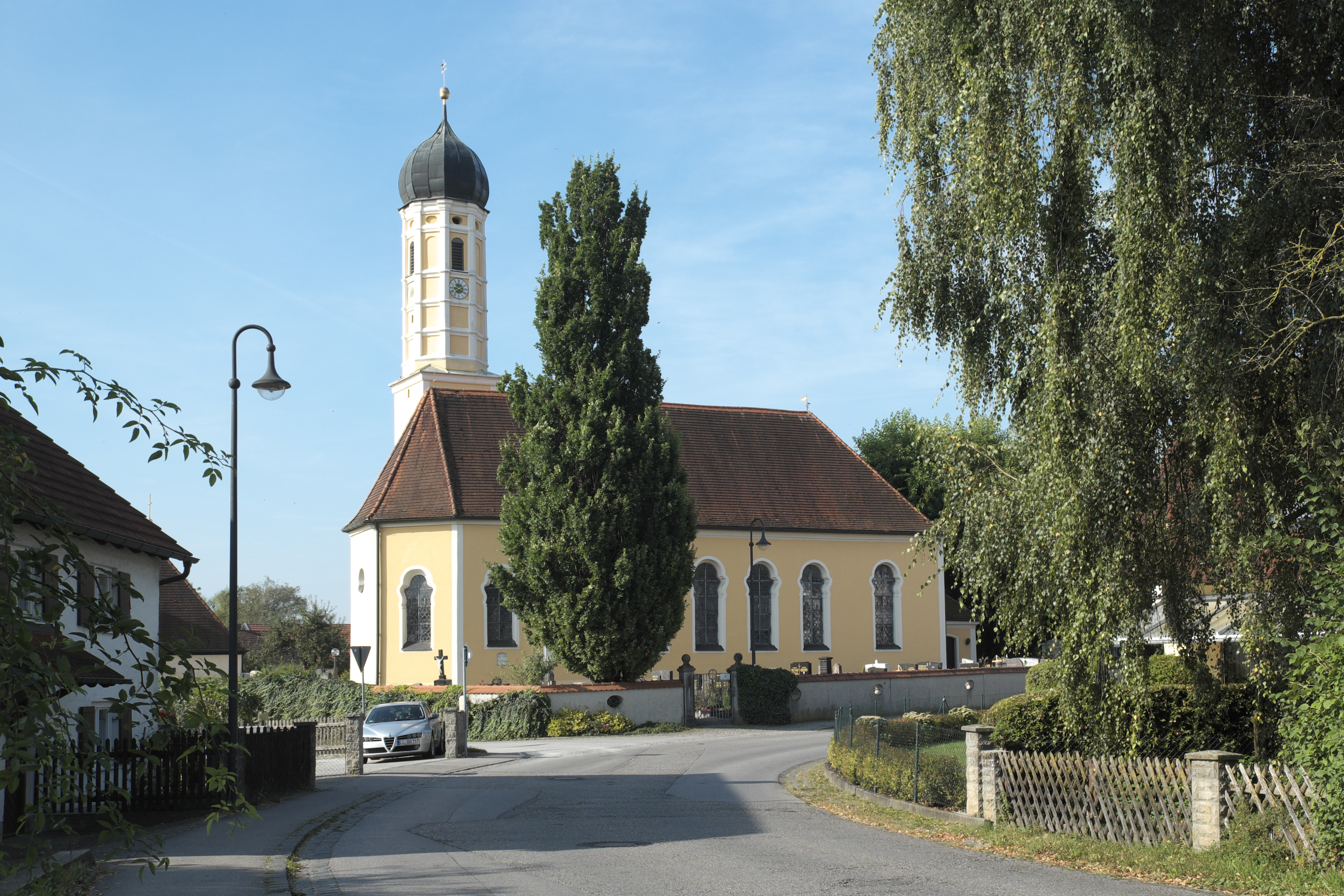 Katholische Pfarrkirche St. Valentin in Kottgeisering im Landkreis Fürstenfeldbruck (Bayern/Deutschland)